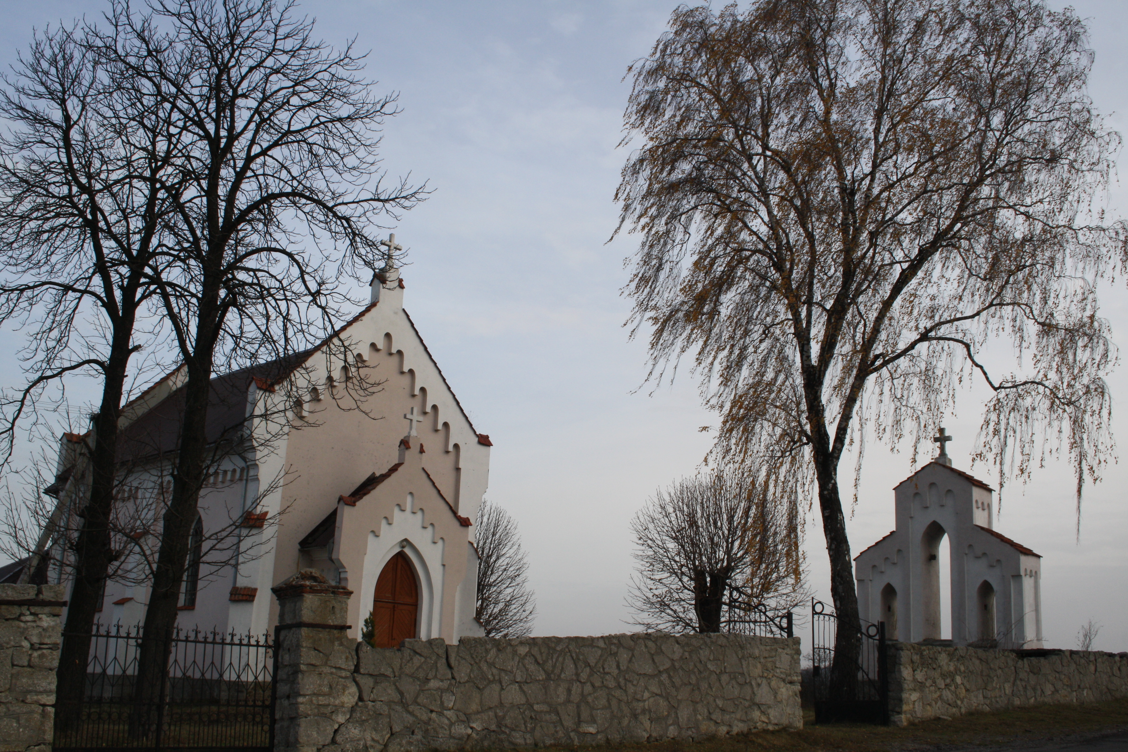 Костел св.Лаврентія,Погорільці, 1910